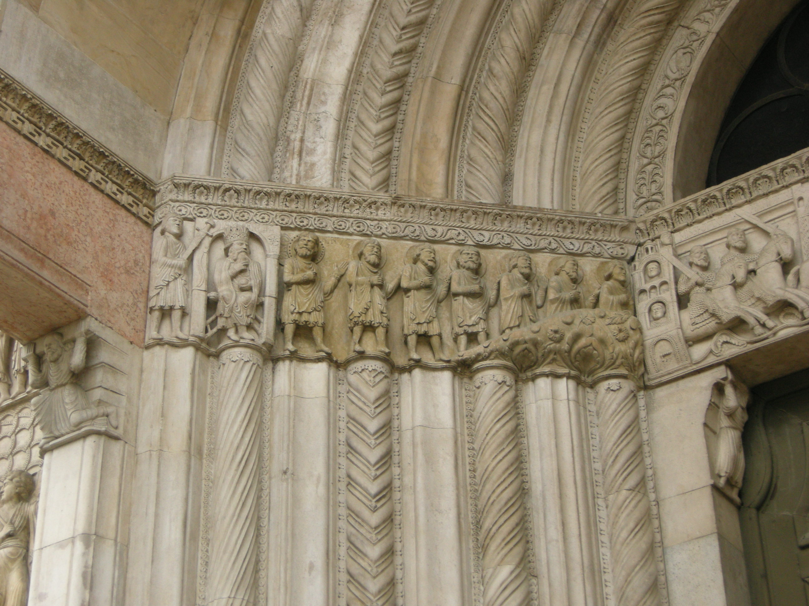 Duomo di fidenza, sculture del portale c.le, congedo e fuga di s. donnino